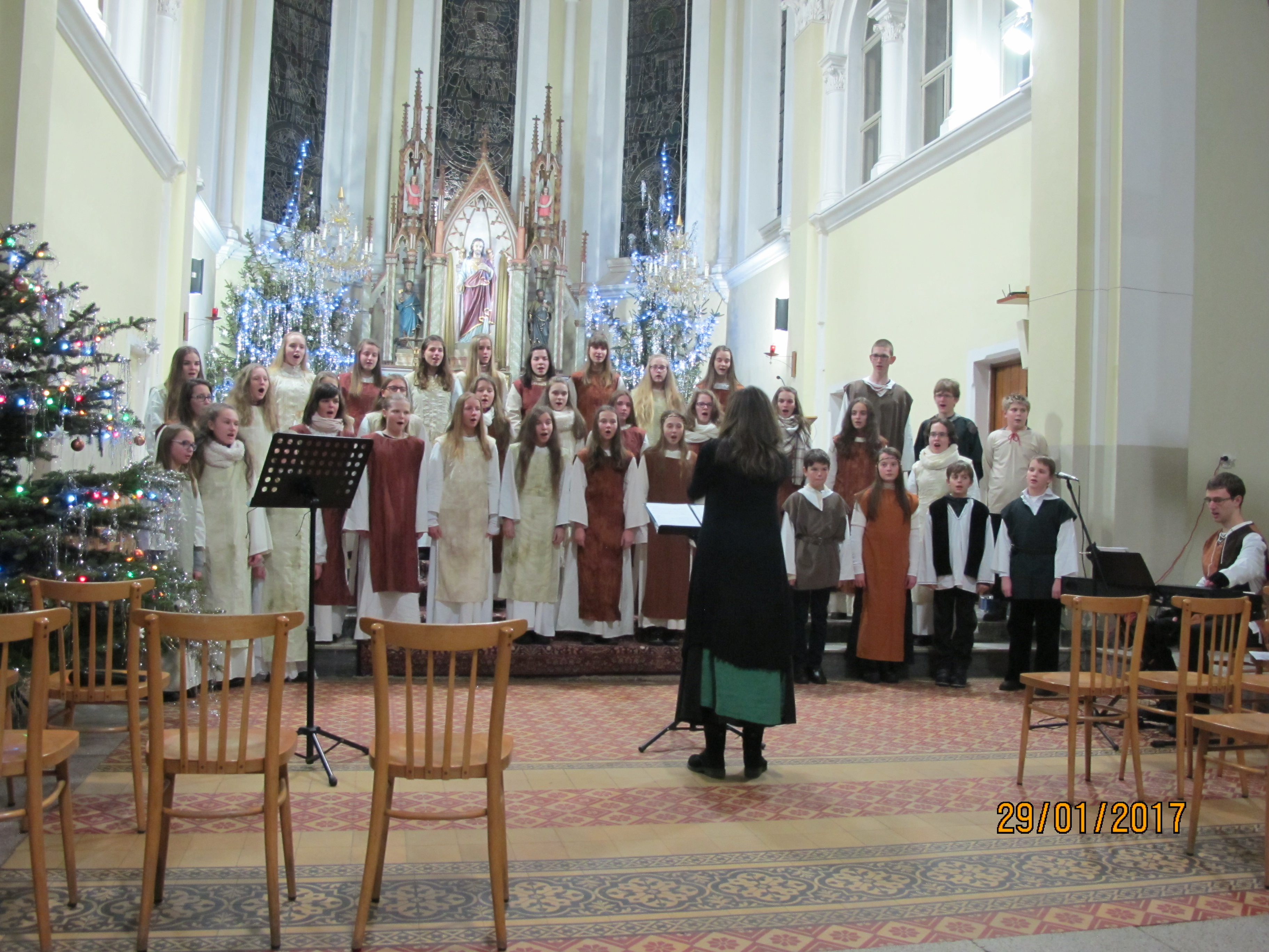 Koncert chóru Trallala w kościele w Czeskim Cieszynie